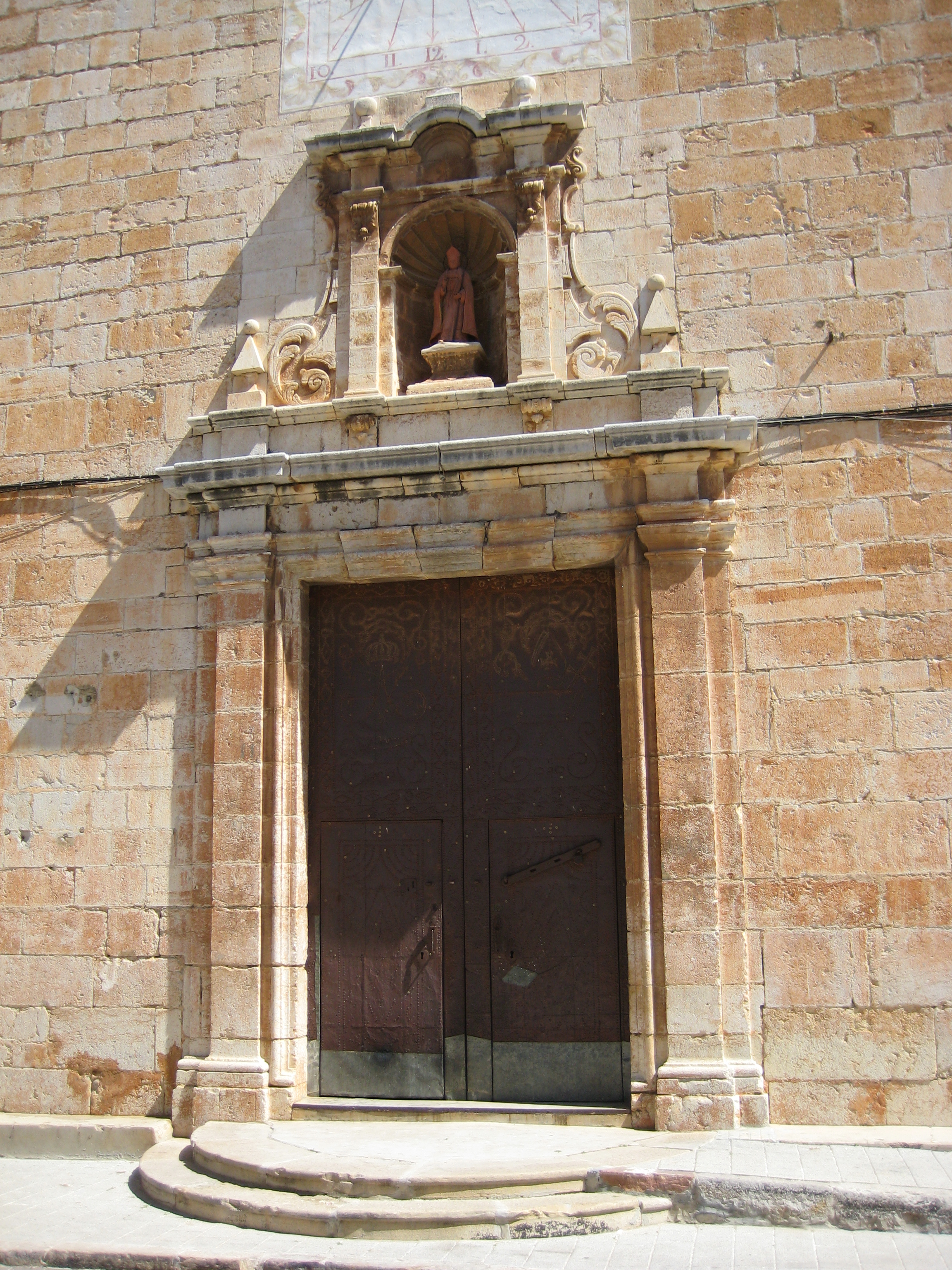 Portada de l'església de l'Assumpció de La Salzadella (Baix Maestrat)